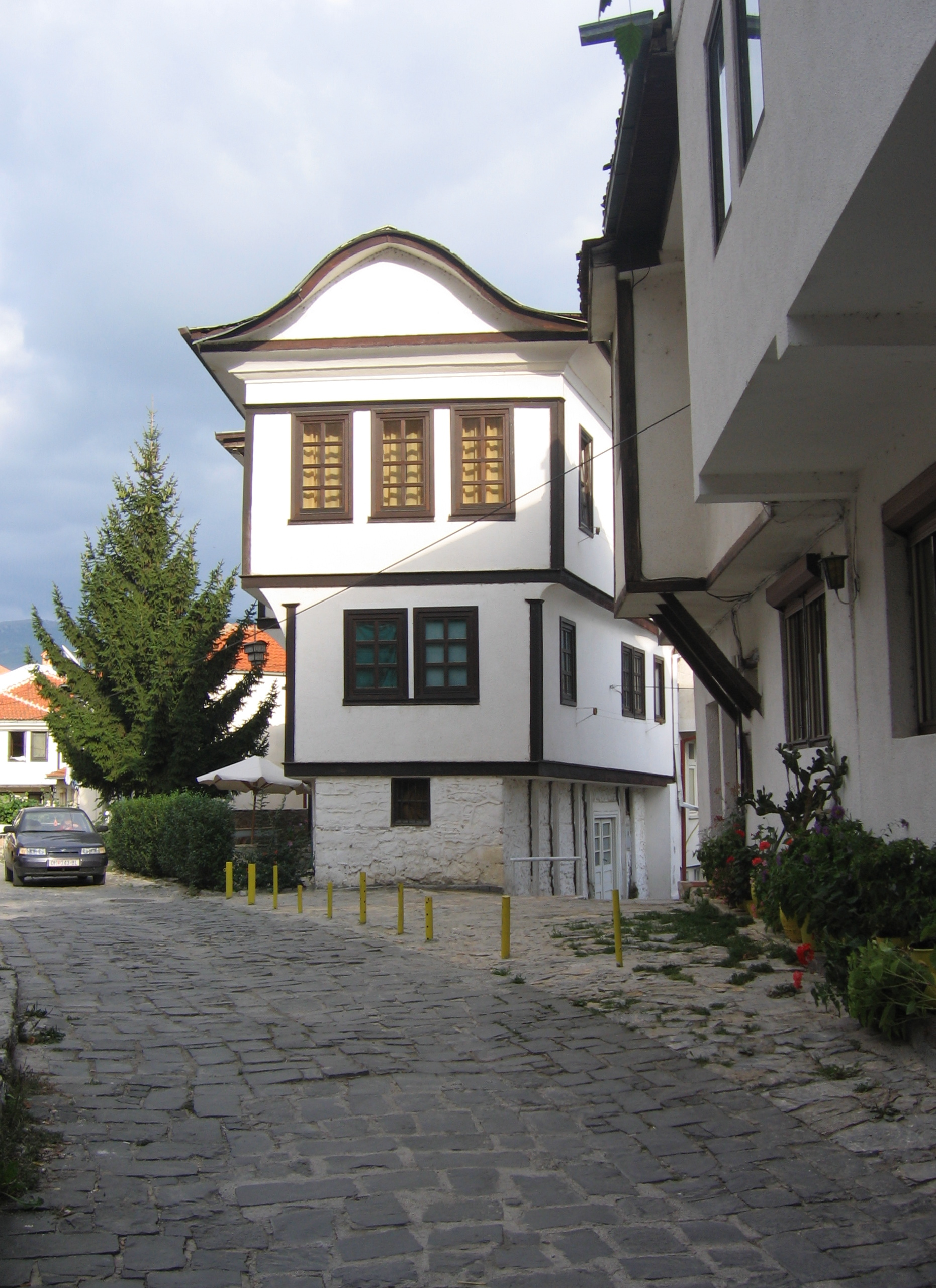 Охрид_2005_3046